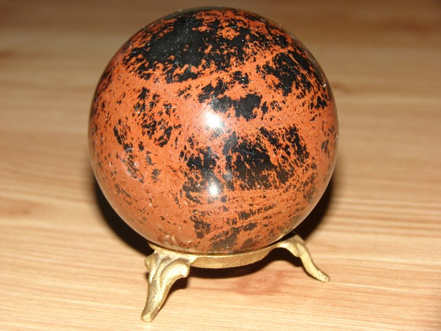 DUŻA KULA Z OBSYDIANU MAHONIOWEGO O ŚREDNICY 70mm, MEKSYK